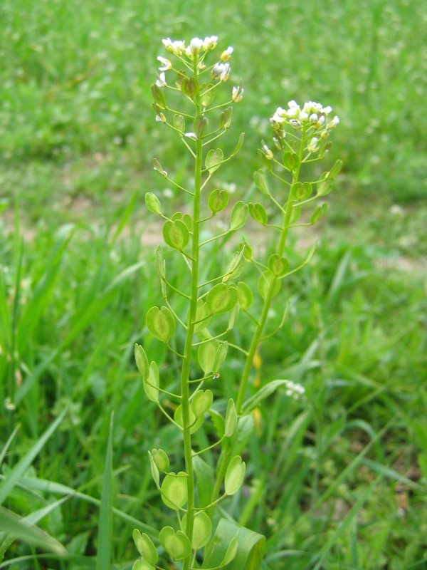 Acker-Hellerkraut Thlaspi arvense, Rügen